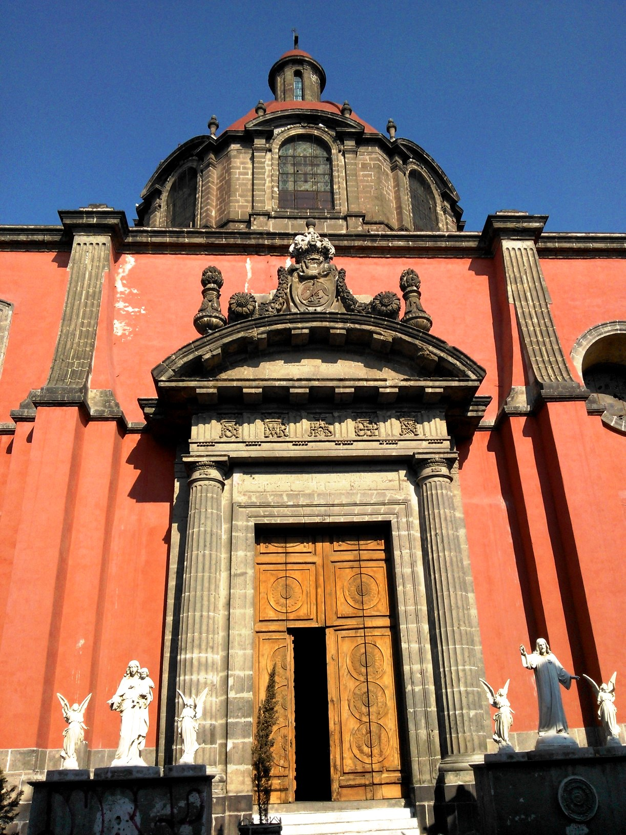 templo de Jesus maria en el barrio de la merced